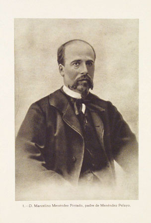 Fotografía de Marcelino Menéndez Pintado, padre de Marcelino Menéndez Pelayo